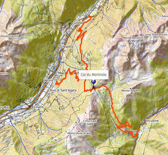 carte réalisée sur umap.openstreetmap